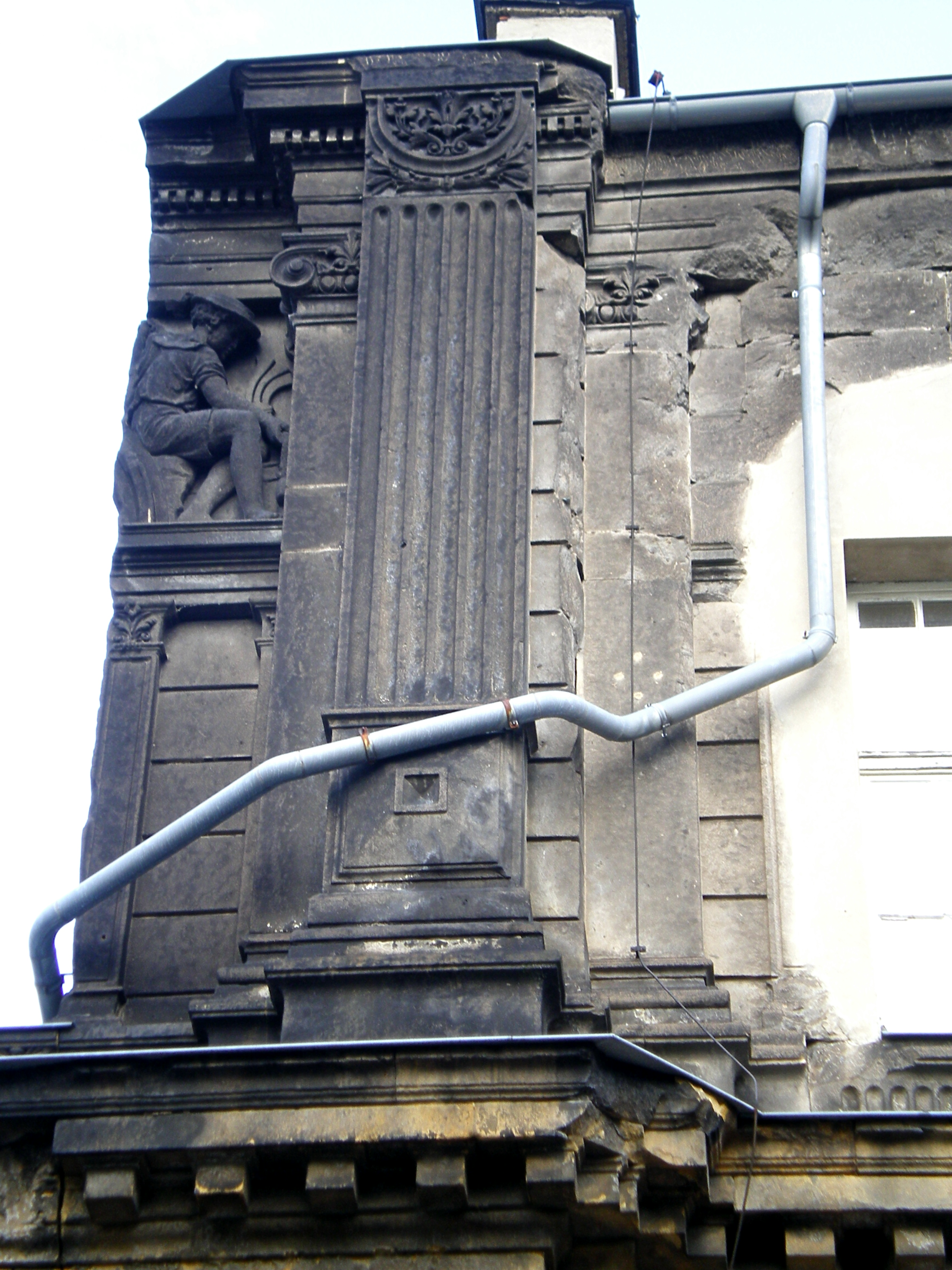 Hölbe, Rudolf – 1905 - Fassadenschmuck am ehemaligen Postamt Altstadt 1 in Dresden – Postplatz